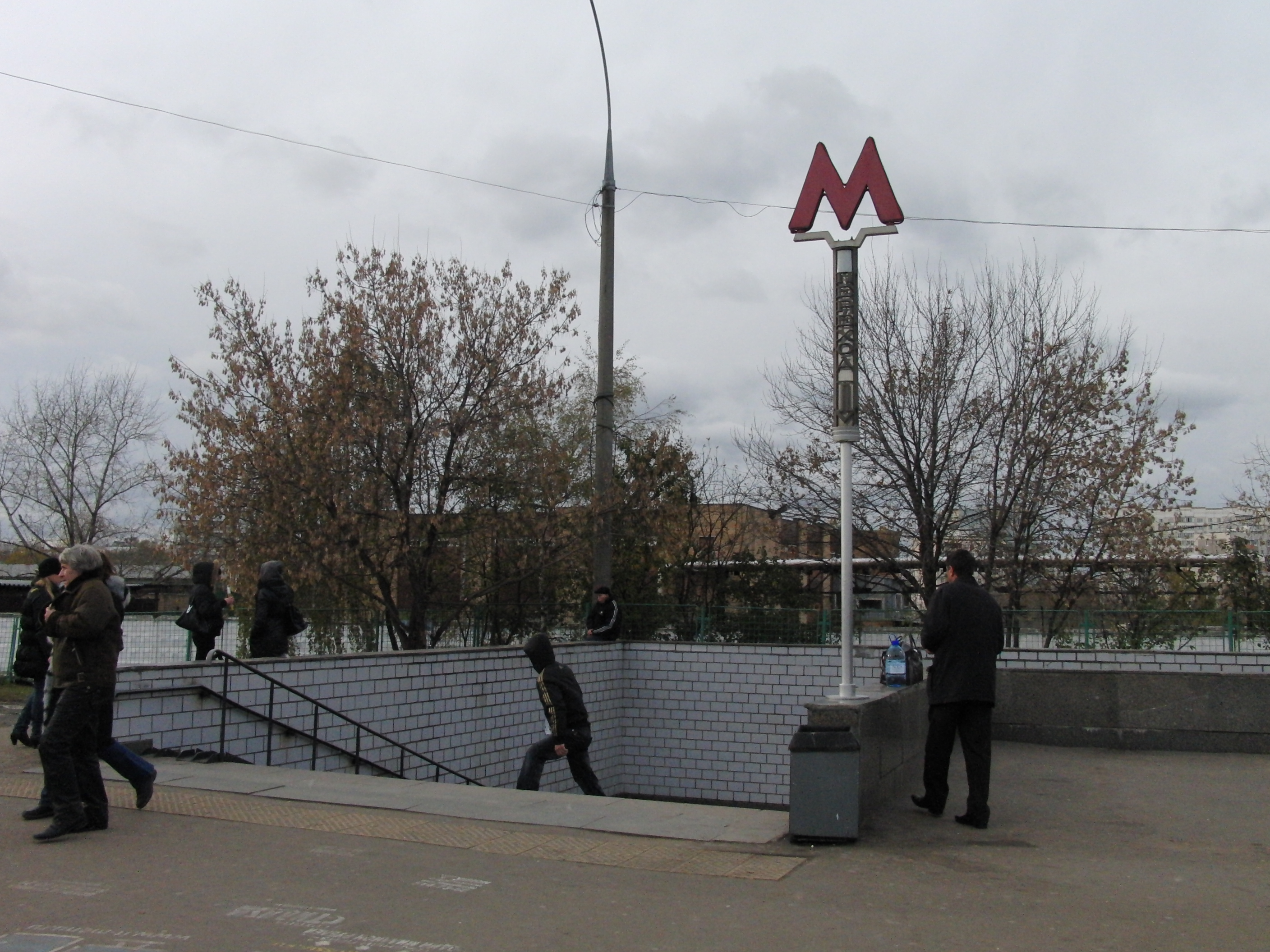 Nagornaya station entry (Вход на станцию Нагорная)